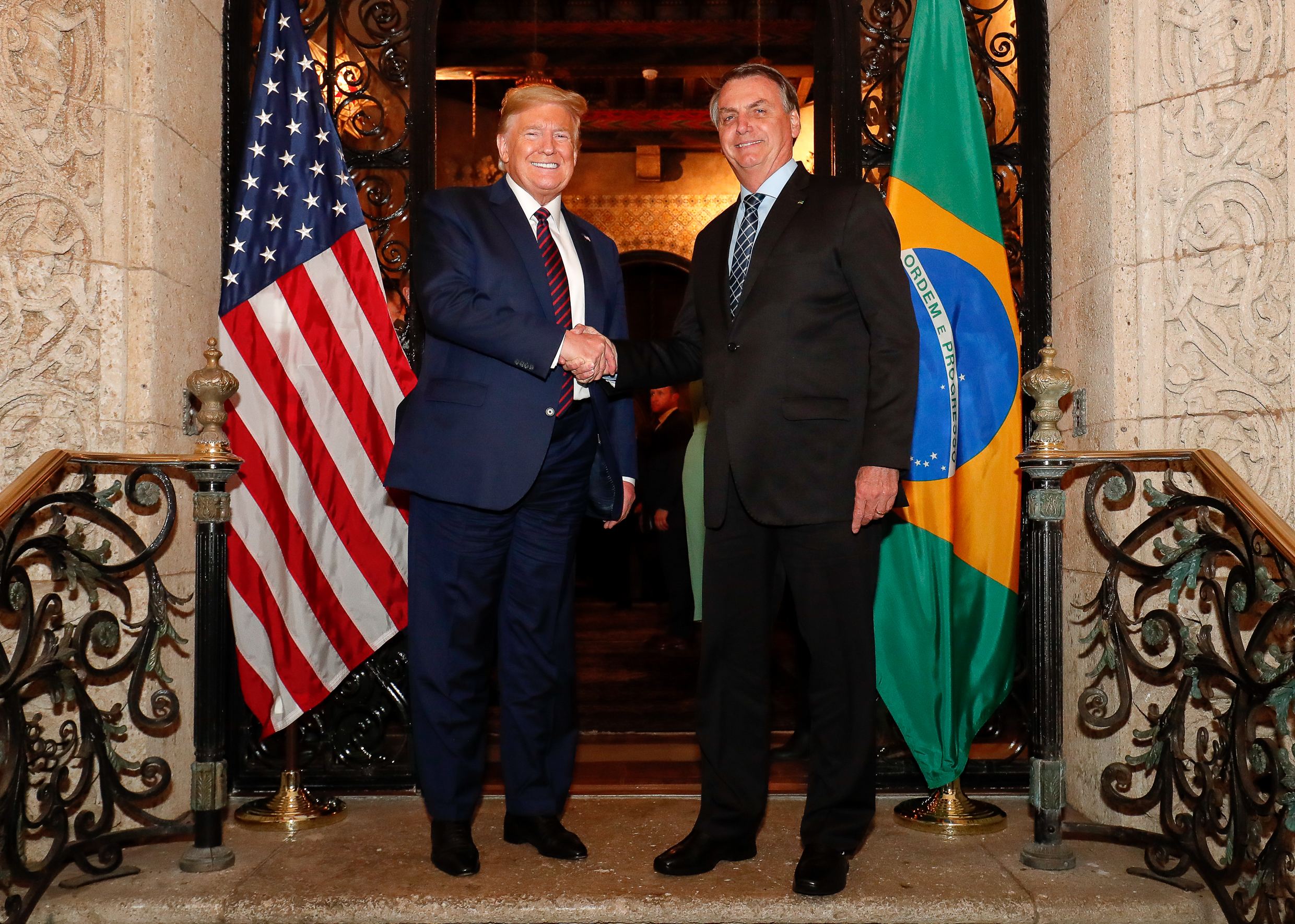 (Mar a Lago - Flórida, 07/03/2020) Presidente da República Jair Bolsonaro acompanhado do Senhor Presidente dos Estados Unidos Donald Trump, posam para fotografia.Foto: Alan Santos/PR